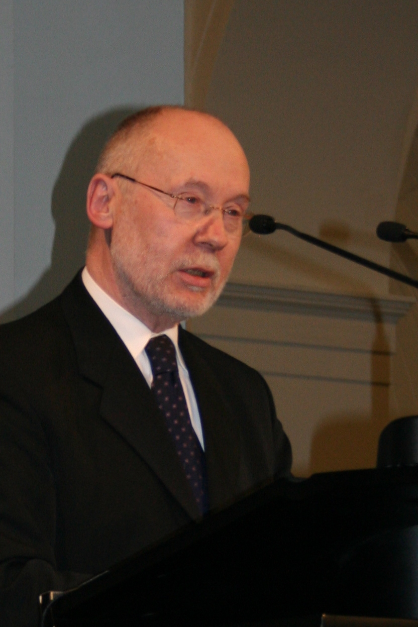 Ansprache beim Neujahrsempfang 2010 des Katholischen Schulverbands Hamburg in der Handelskammer Hamburg